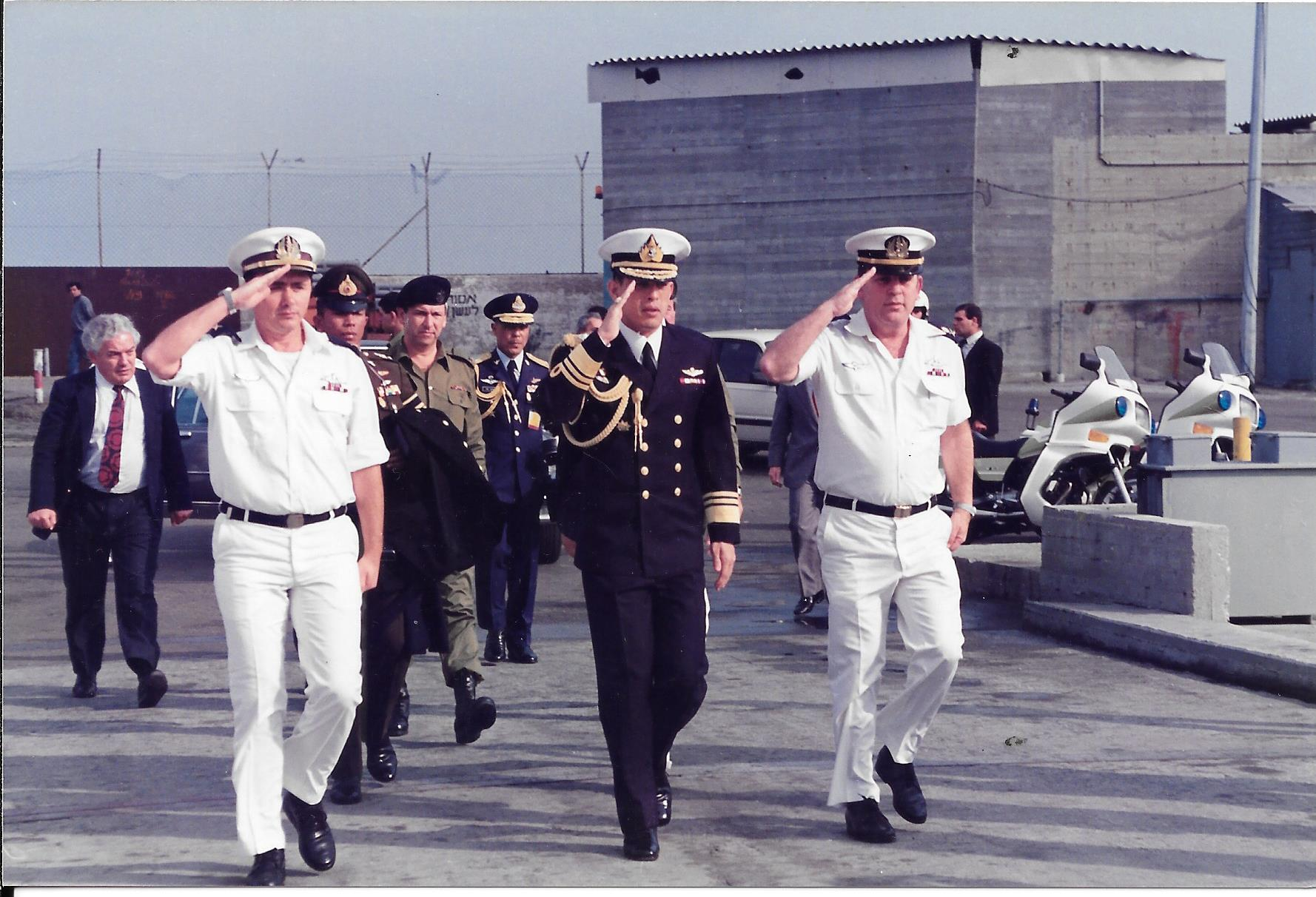 אלוף רם ותא"ל אלכס טל מארחים את מאהה וצ'יראלונגקון, מלך תאילנד אז עדיין יורש העצר של תאילנד בבסיס חיפה 1989